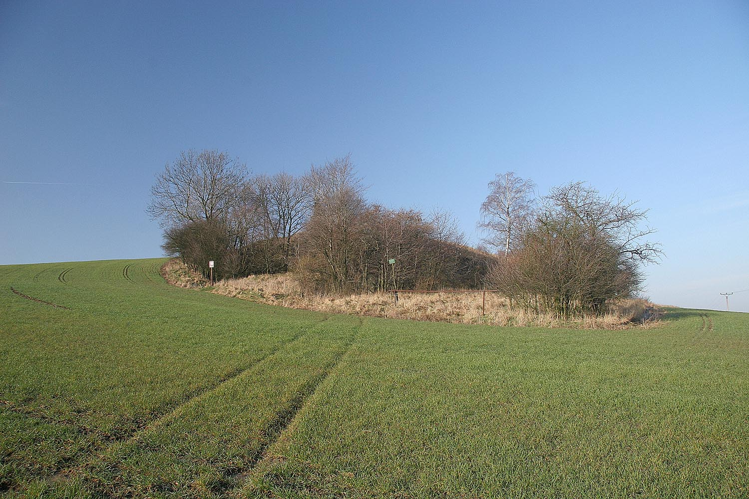 Natural monument Dubolka, district Jičín near village Ohařice, Czech Republic autor:Prazak date:11. 3. 2007